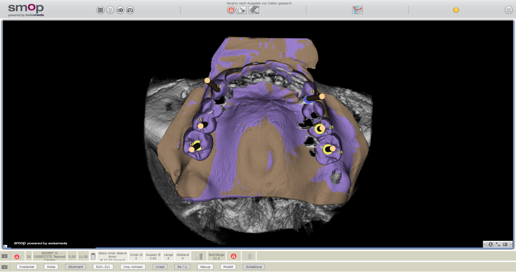 Planungstool für navigierte Implantologie: DVT, Modell-STL, Wax-up abgebildet